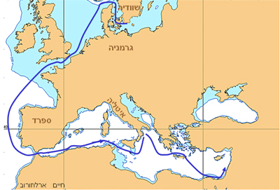 אוניית המעפילים חיים ארלוזורוב - מסלול